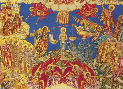 Эскиз фрески для храма Успения Богородицы в Ольшанах.